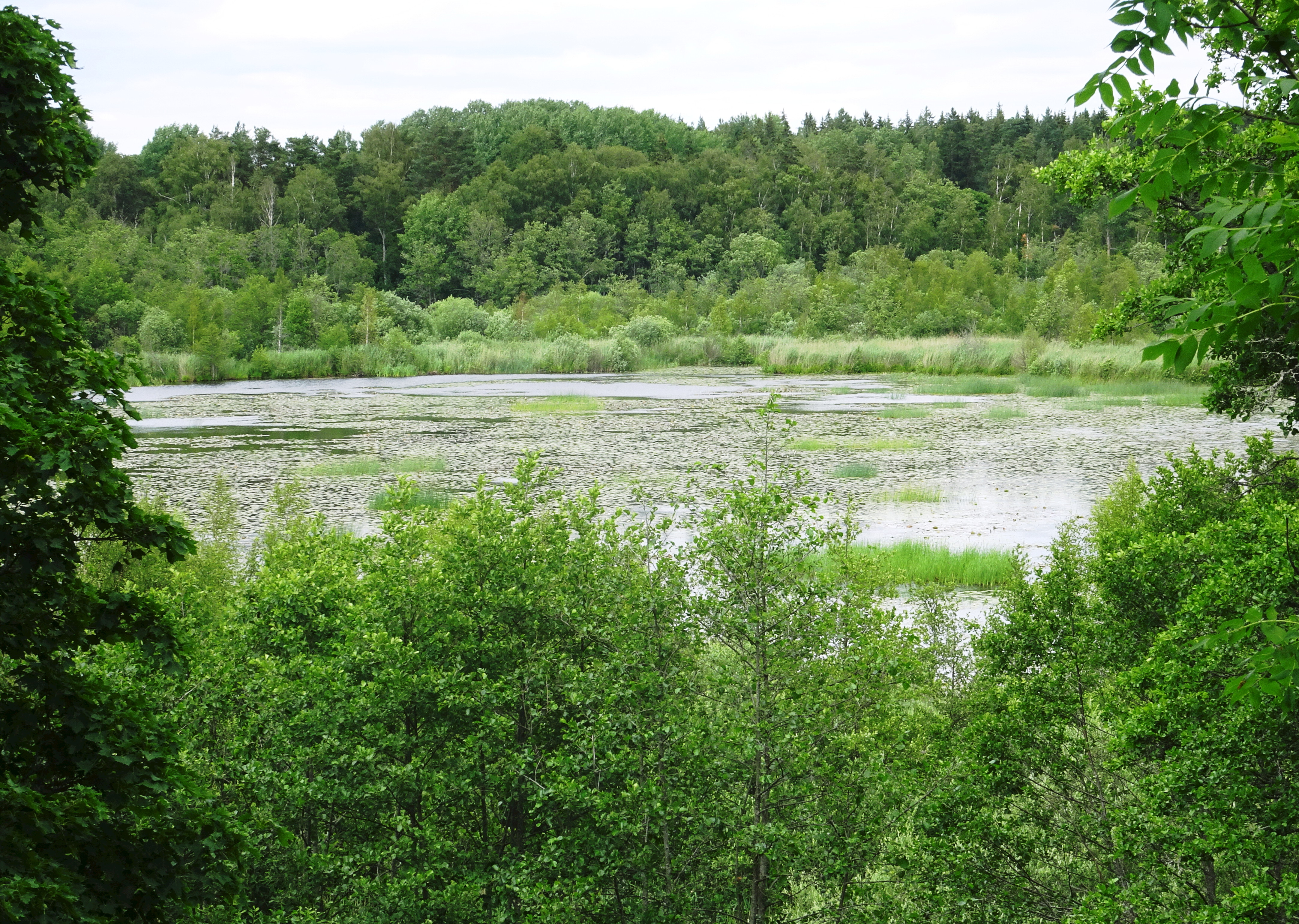 Lillsjön sedd från Vasakullen på Lindholmen